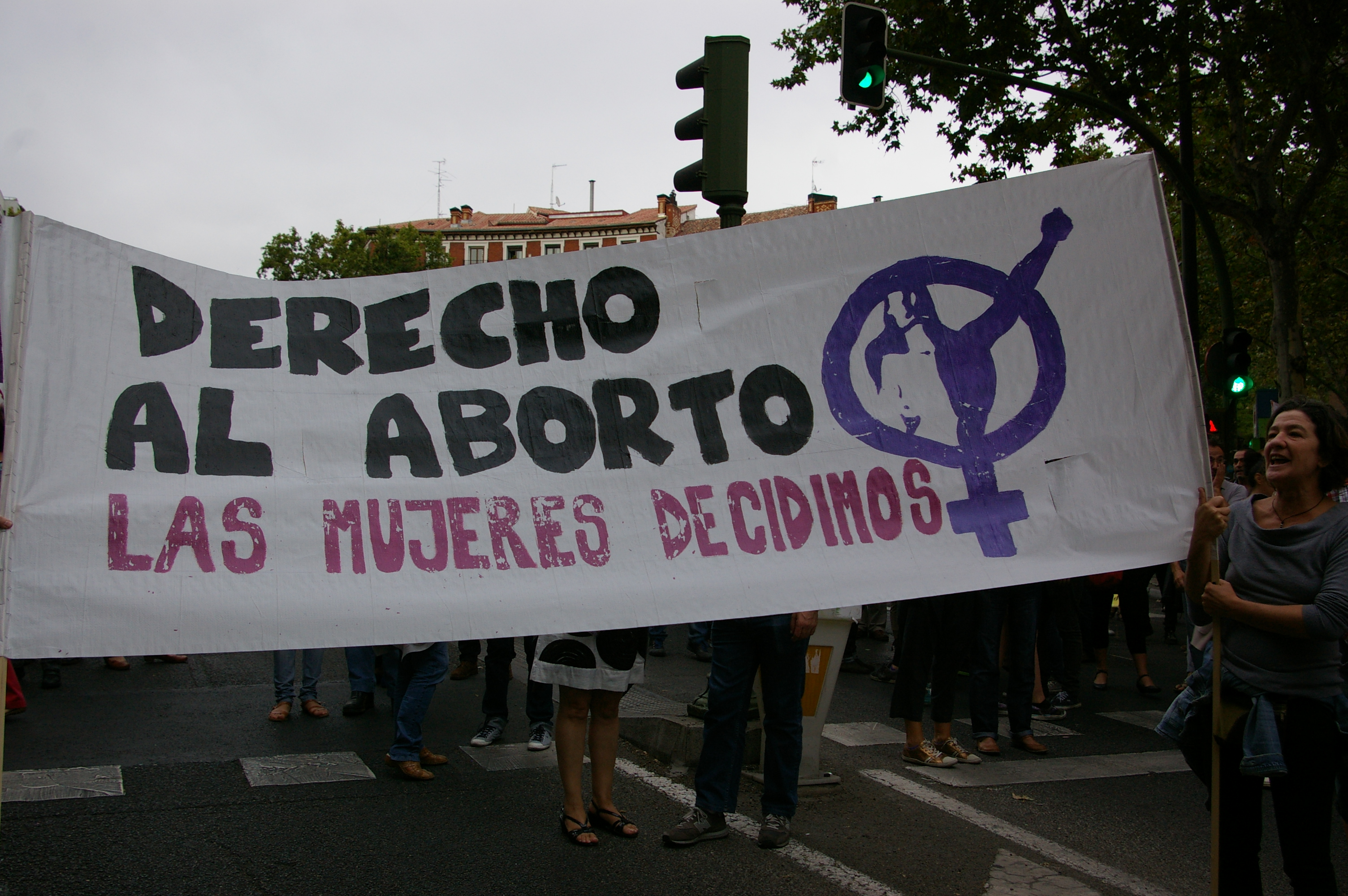 Manifestación en defensa del derecho al aborto y en contra de la reforma del código penal anunciada por el ministro de Justicia, Alberto Ruiz-Gallardón, en Madrid en 2014.